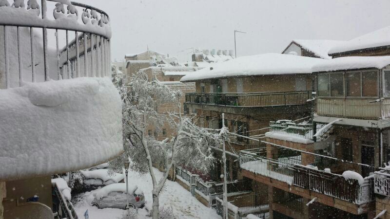 שלג בירושלים - סופת שלגים אחת הגדולות, ב-13 בדצמבר 2013 רחוב הירקון בירושלים בשכונת נחלאות